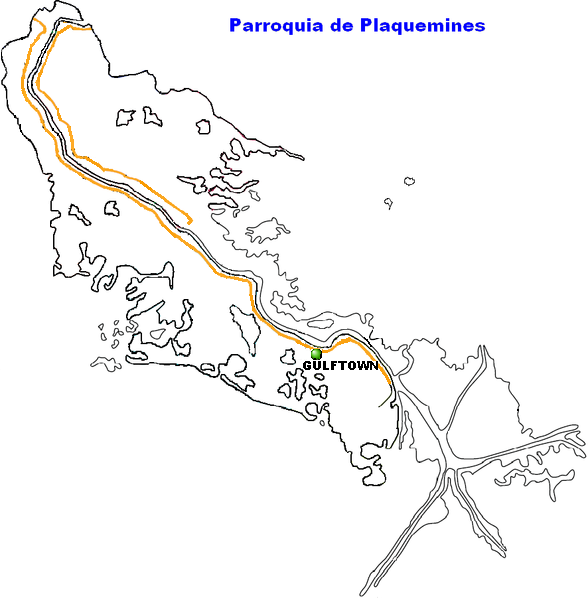 Gulftown, Louisiana